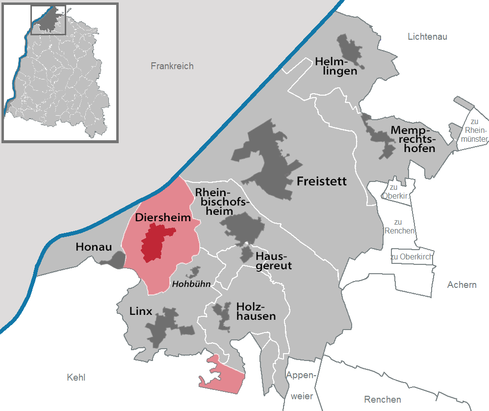 Lage von Diersheim in Rheinau